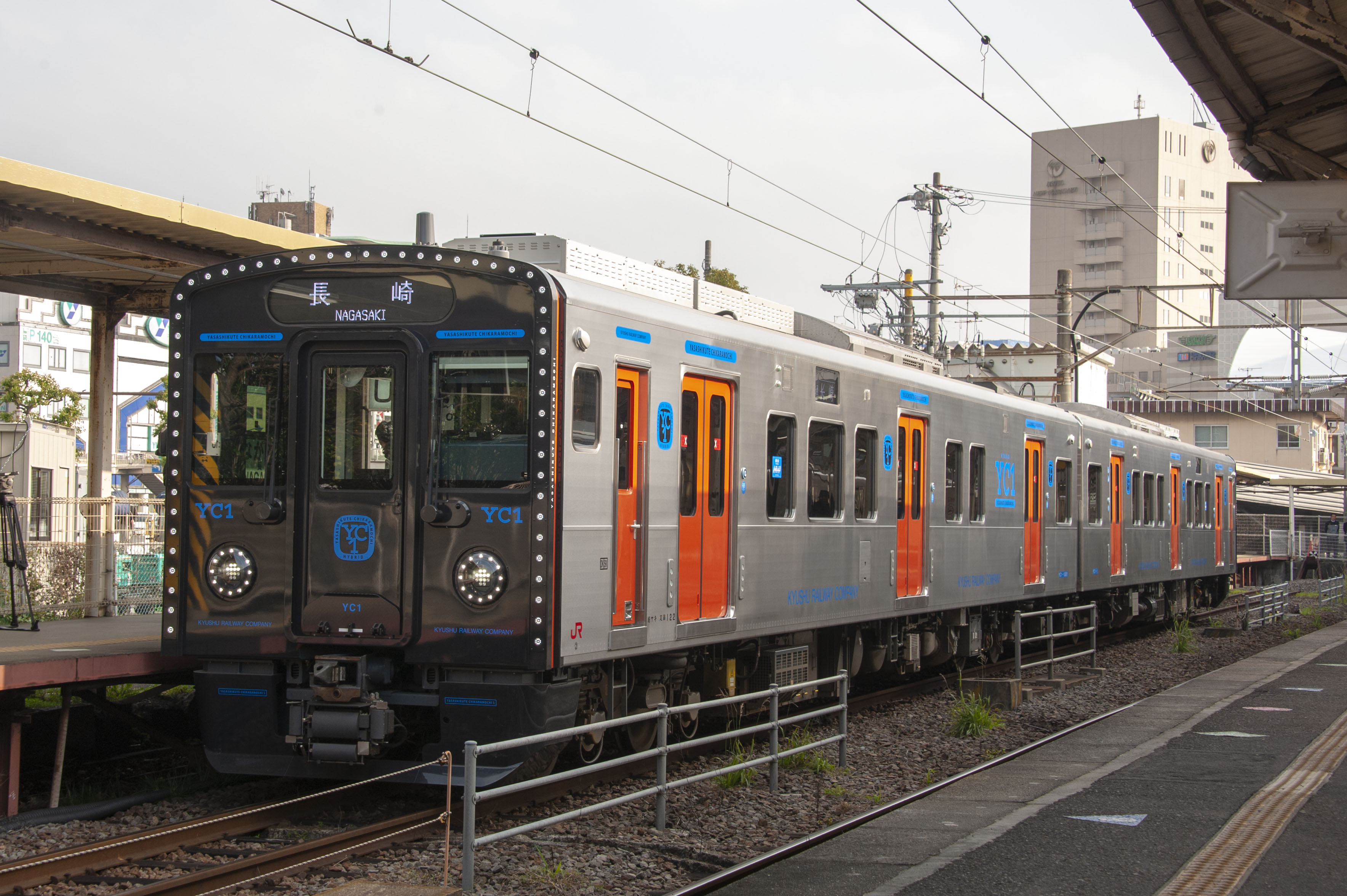 JR九州 YC1系気動車